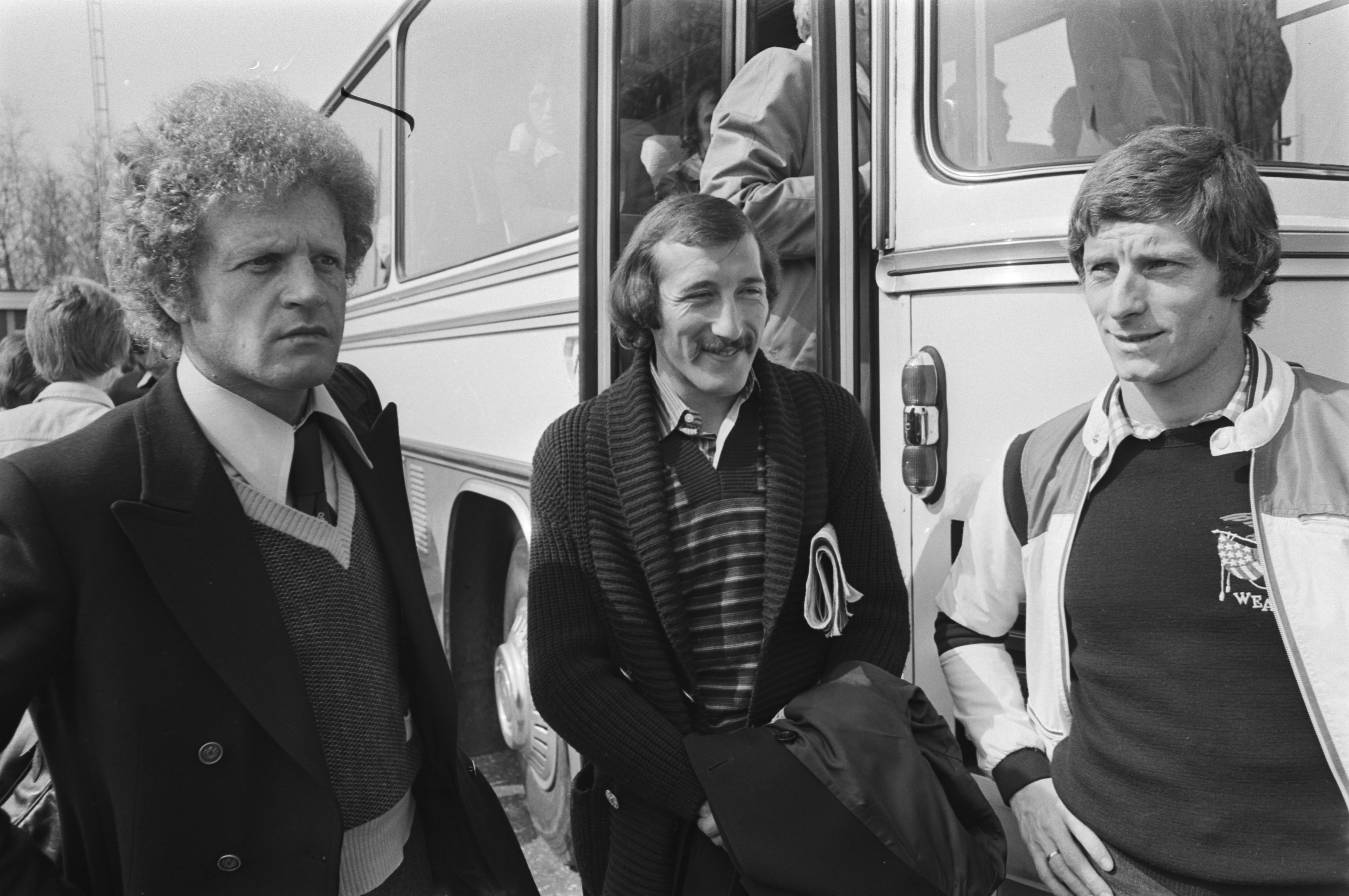 Collectie / Archief : Fotocollectie Anefo Reportage / Serie : [ onbekend ] Beschrijving : Aankomst spelers St. Etienne op vliegveld van Eindhoven v.l.n.r. trainer Robert Herbin, Patrick Revelli en doelpuntmaker Jean.Michel Larqué Annotatie : Voor halve finale wedstrijd Europacup I tegen PSV op 14 april 1976 Datum : 13 april 1976 Locatie : Eindhoven, Noord-Brabant Trefwoorden : sport, voetbal, voetballers Persoonsnaam : Herbin, Robert, Revelli, Patrick Fotograaf : Mieremet, Rob / Anefo Auteursrechthebbende : Nationaal Archief Materiaalsoort : Negatief (zwart/wit) Nummer archiefinventaris : bekijk toegang 2.24.01.05 Bestanddeelnummer : 928-5229